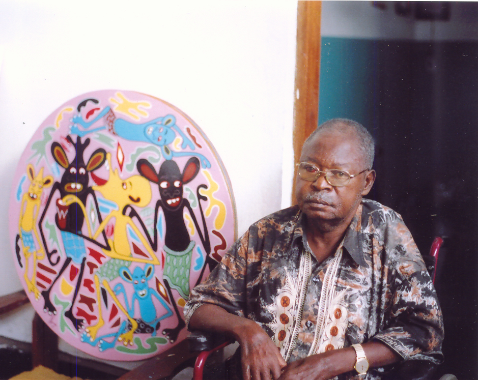 Foto ed opera di mia proprietà (Cesare Pippi); fonte: dal Catalogo "George Lilanga: Colori d'Africa" curato da Cesare Pippi; la foto mostra l'artista tanzano George Lilanga insieme ad una delle sue opere maggiormente pubblicate; licenza d'uso: GFDL e Creative Commons CC-BY-SA tutte le versioni.